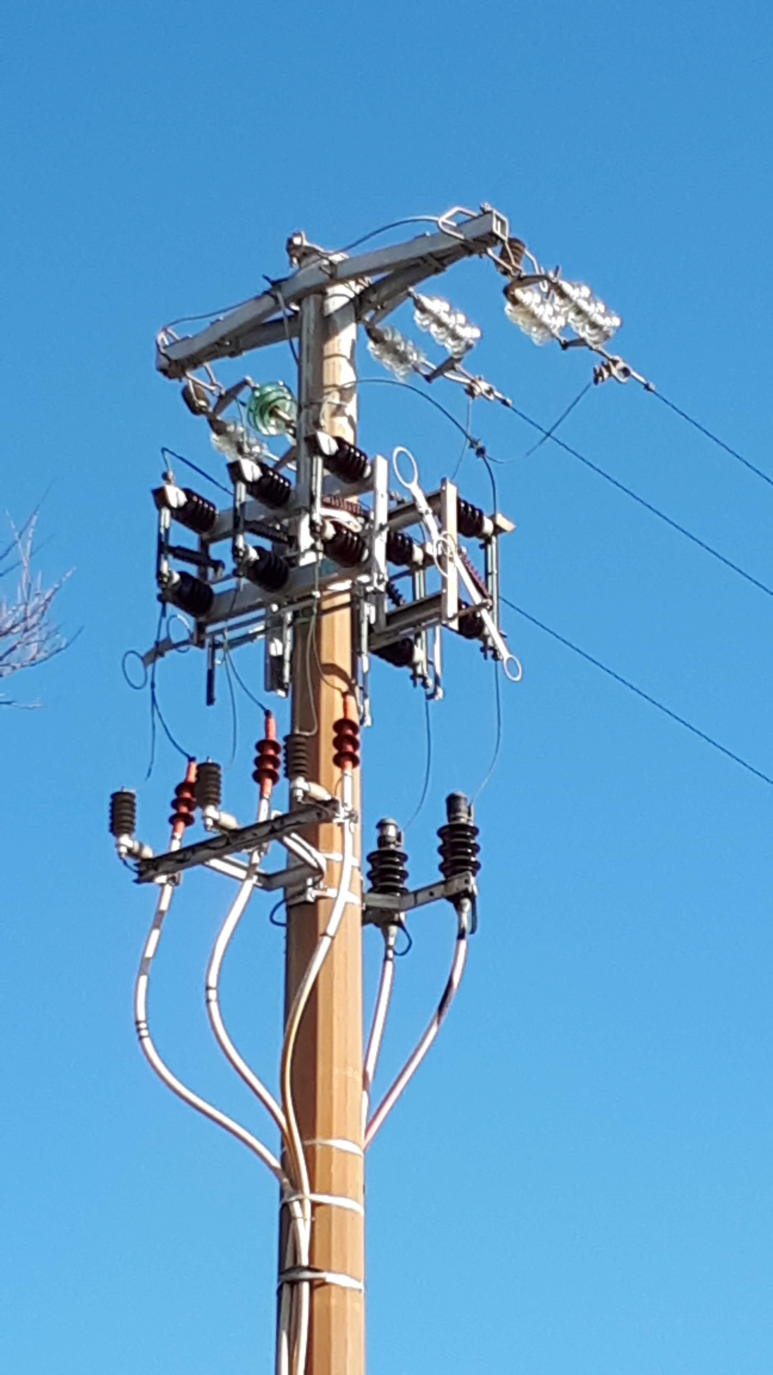 Linea aerea trifase in media tensione (15kV) che alimenta due linee trifase in cavo che possono essere alimentate o meno mediante manovra dei due sezionatori sottostanti. Si tratta di una configurazione di alimentazione tipica di una cabina di trasformazione MT/bt di una zona periferica di una città. La linea aerea alimenta i cavi che vanno alla cabina di trasformazione MT/bt per la successiva distribuzione in bassa tensione 230/400V